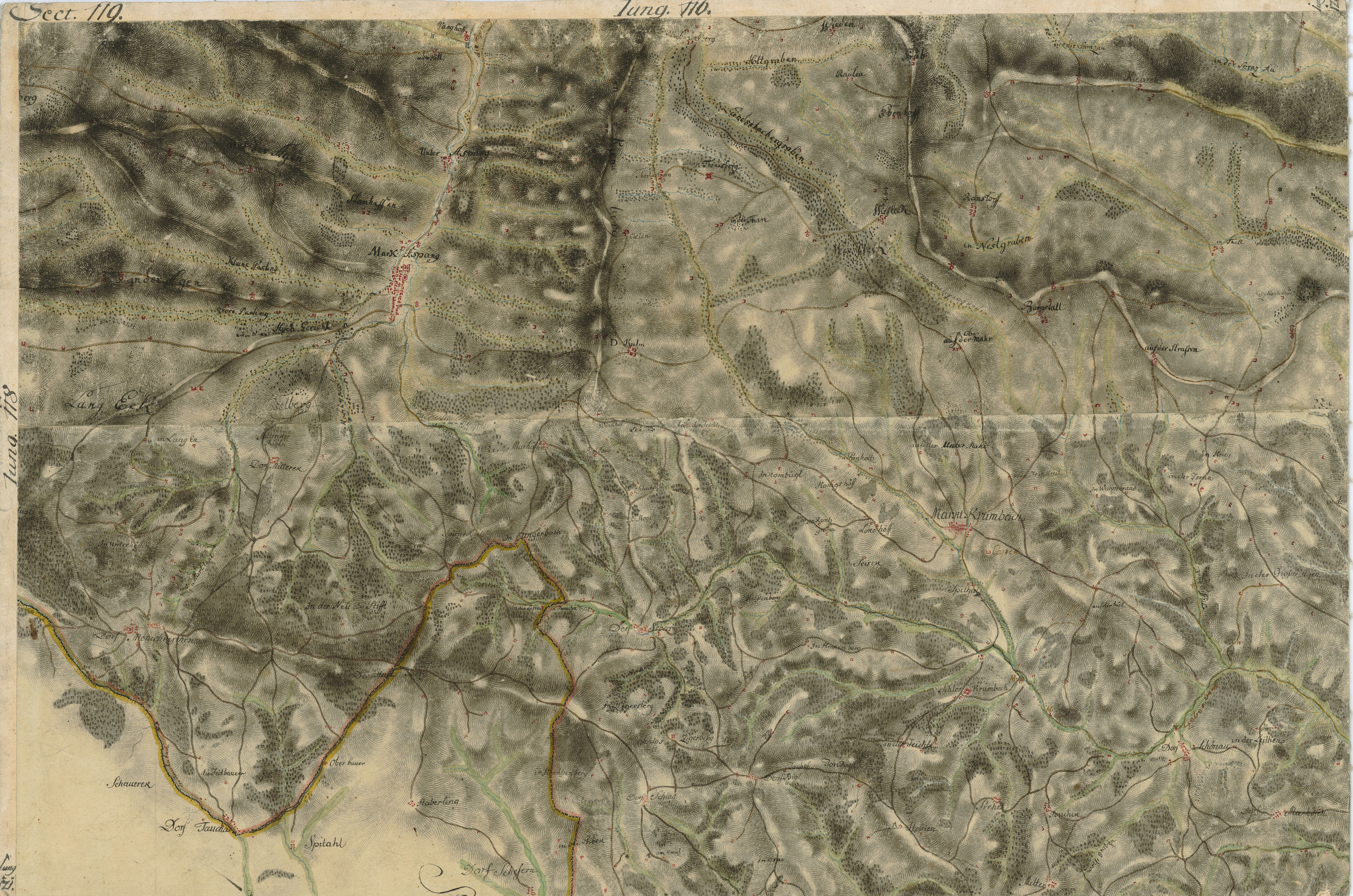 historische Landkarte BIXa242 sect.119 Josephinische Landesaufnahme: Aspang, Pittental, Wechselgebiet, Niederösterreich, Österreich